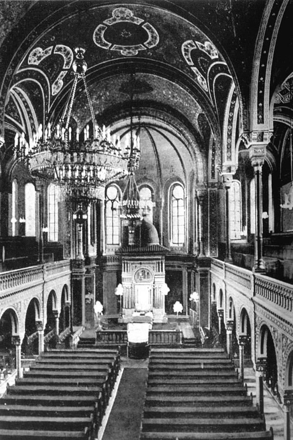 Wielka synagoga w Łodzi